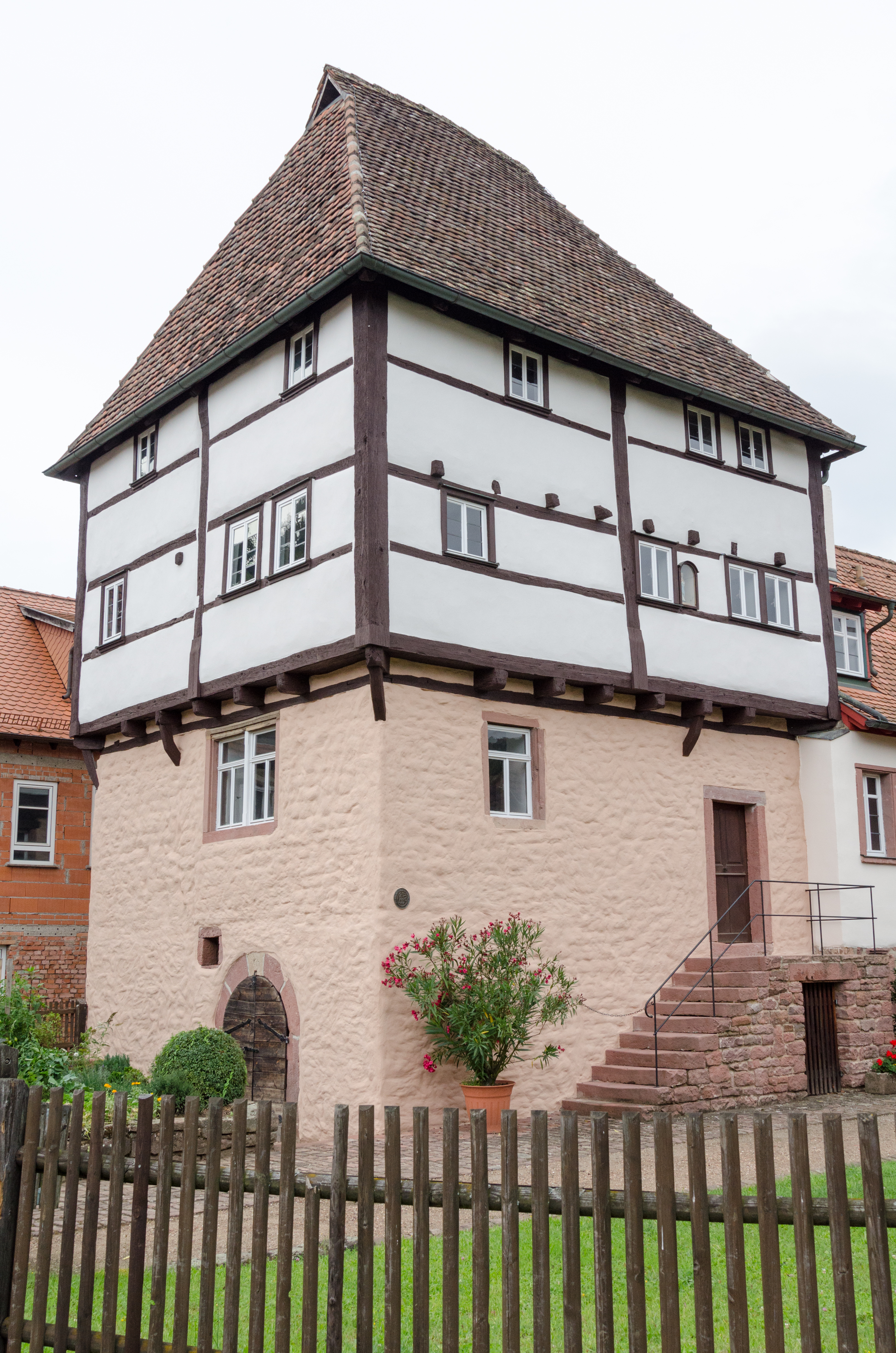 Amorbach, Templerhaus